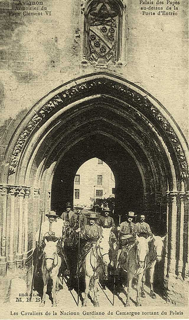 Le marquis Folco de Baroncelli et la Nacioun Gardiano sortant à cheval de la cour d'honneur du palais des papes d'Avignon